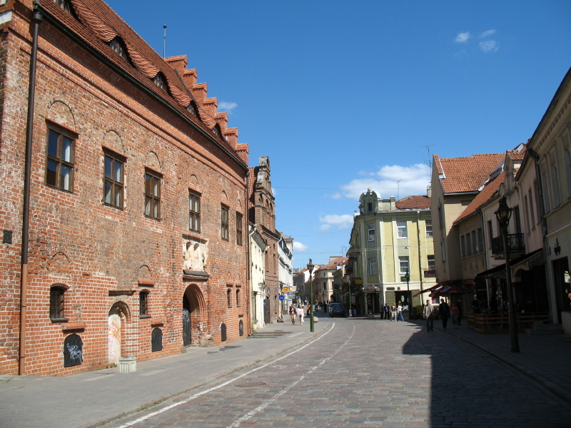 Kauno senamiestis, Vilniaus gatvė.